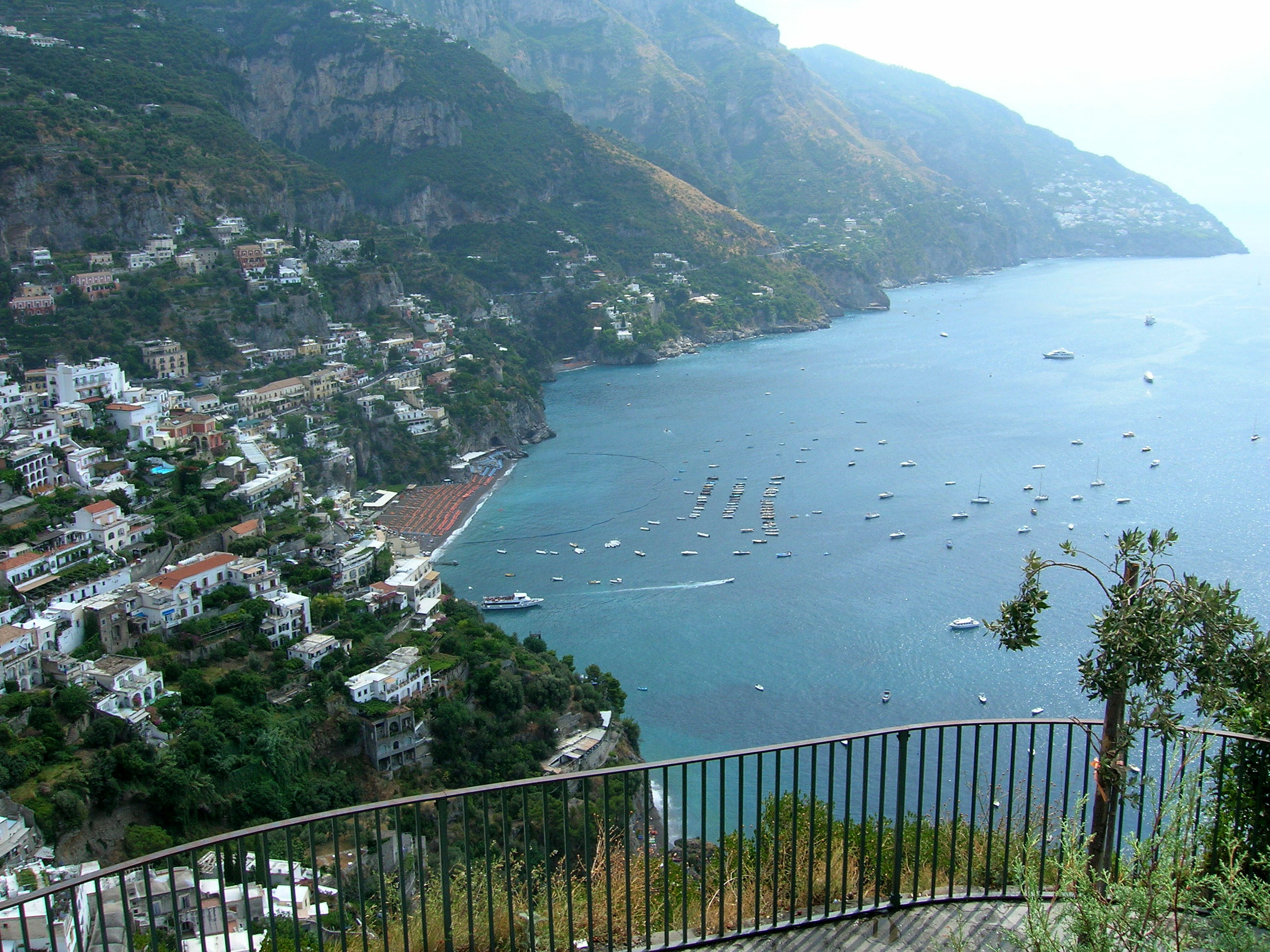 Panorama vun der Amalfitana Küstestrooss aus gesi.